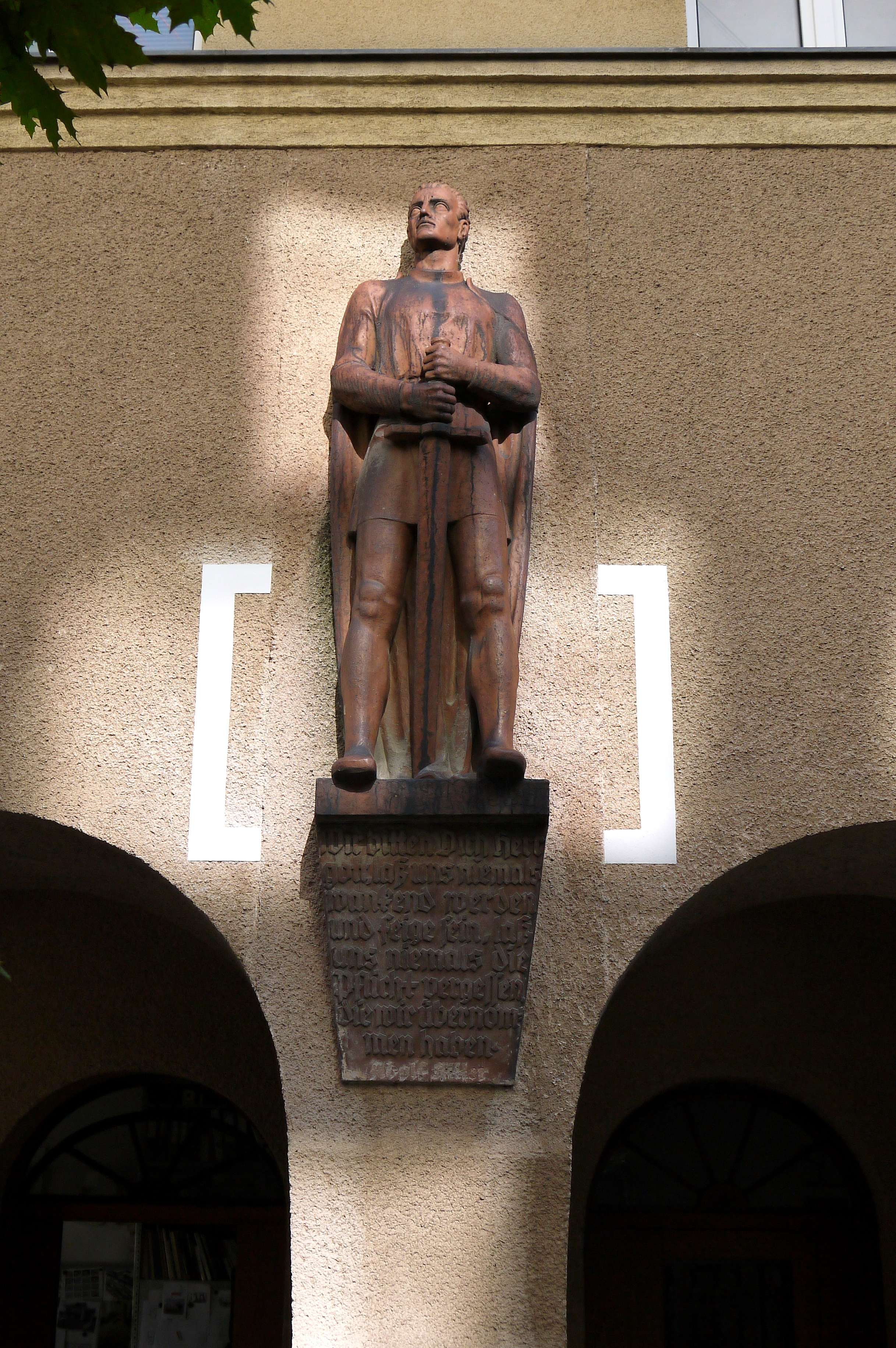 Thuryhof - Wohnhausanlage der Gemeinde Wien aus dem Jahr 1926, Rolandstatue von Alfred Crepaz aus dem Jahr 1939 (mit Hitler-Zitat, Signatur von Adolf Hitler wurde nach dem Krieg entfernt, ist aber noch sichtbar); Transkription 2010 von Maria Theresia Litschauer.